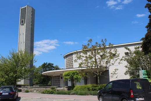 Algemeen zicht op de kerk: de losstaande toren, de inkompartij onder de betonnen luifel en het 'schelpvormige' schip. Architect: Jos Gabriëls.